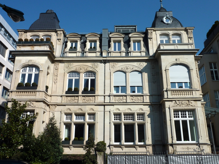 Denkmalgeschütztes Doppelmietshaus des Neobarock von 1902 am Kettenhofweg Nr. 124/124a in Frankfurt am Main (Stadtteil Westend-Süd).